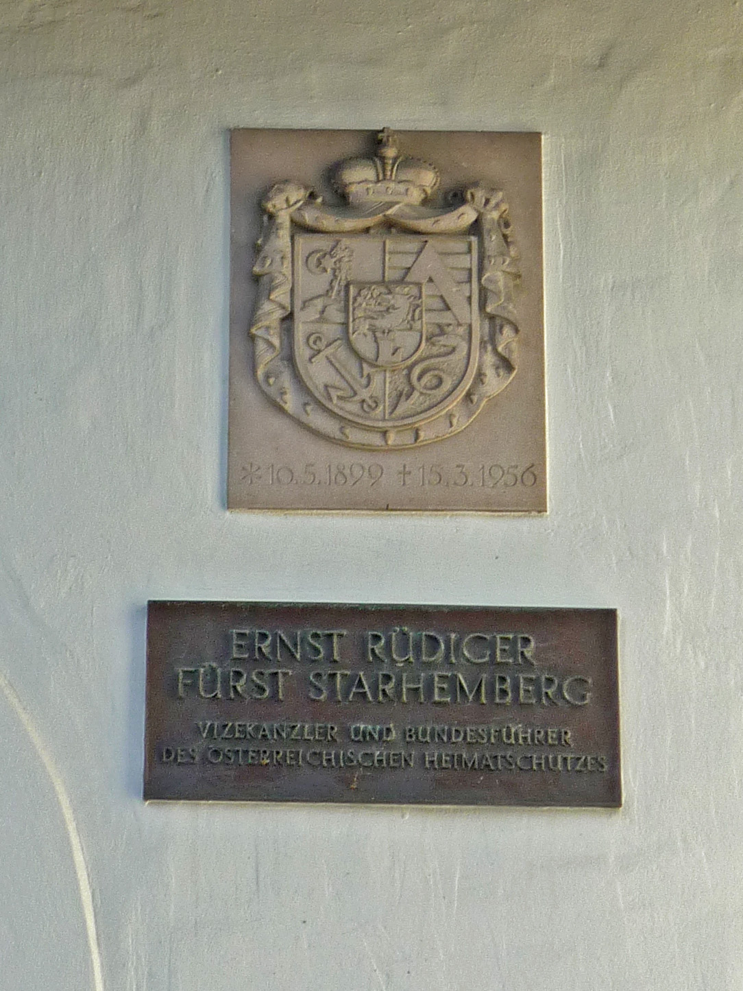 Gedenktafel und Wappen des Ernst Rüdiger Fürst Starhemberg (* 1899 in Eferding, † 1956 in Schruns) an der Litzkapelle in Schruns, Detail eines denkmalgeschützten OBjekts